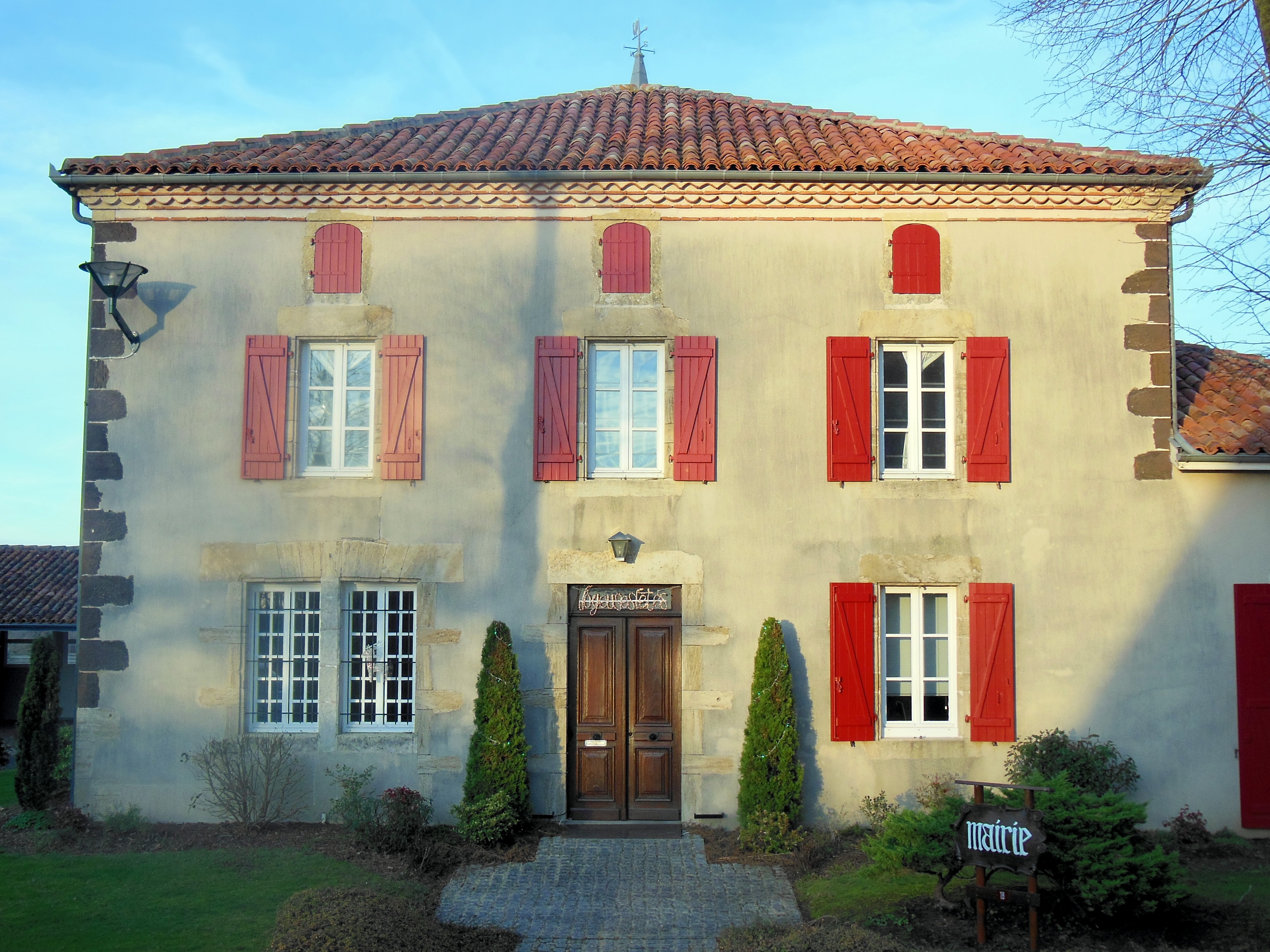 Mairie de Larbey (Landes, France)